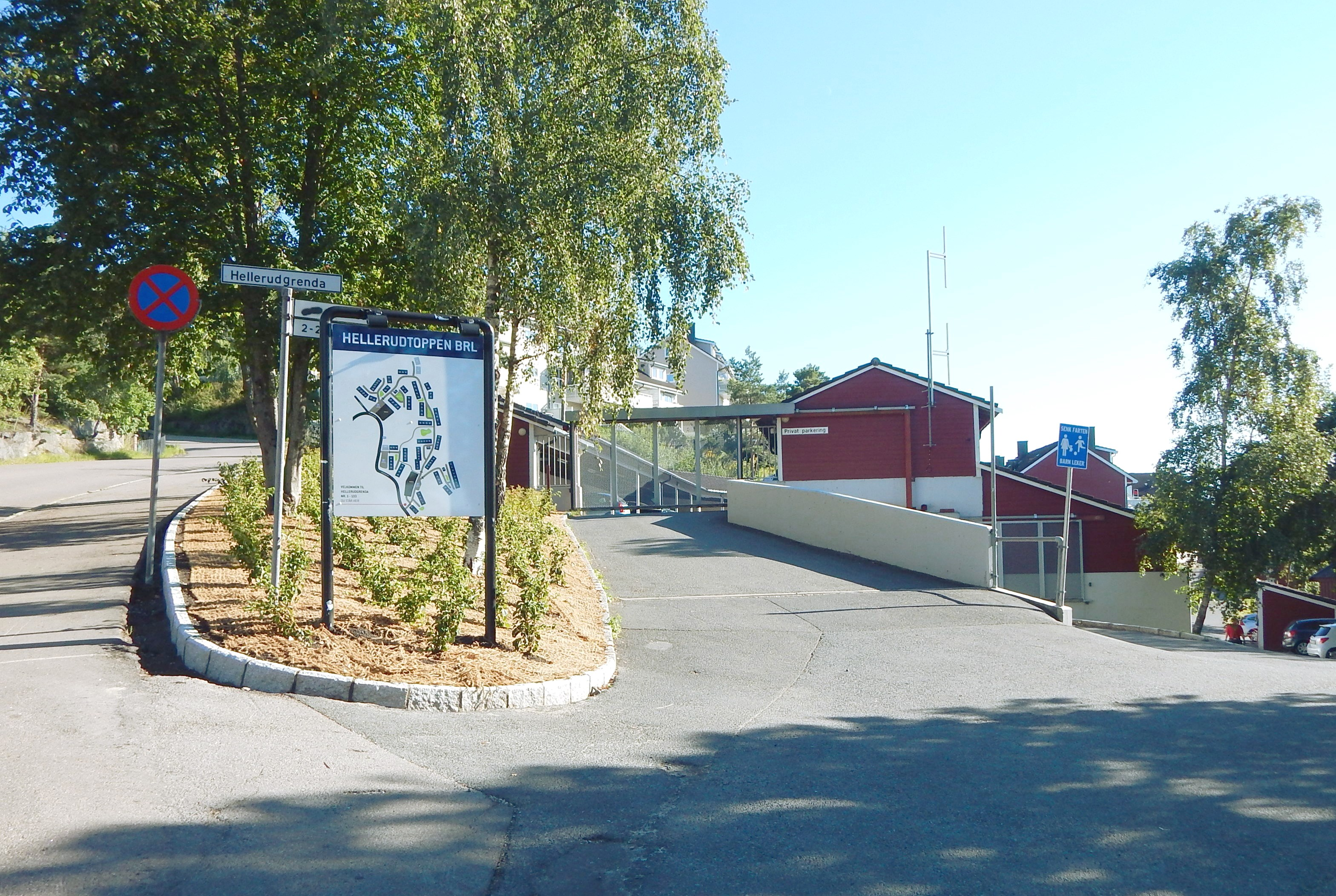 Hellerudgrenda (t.h.) tar av fra Rundtjernveien (t.v.).